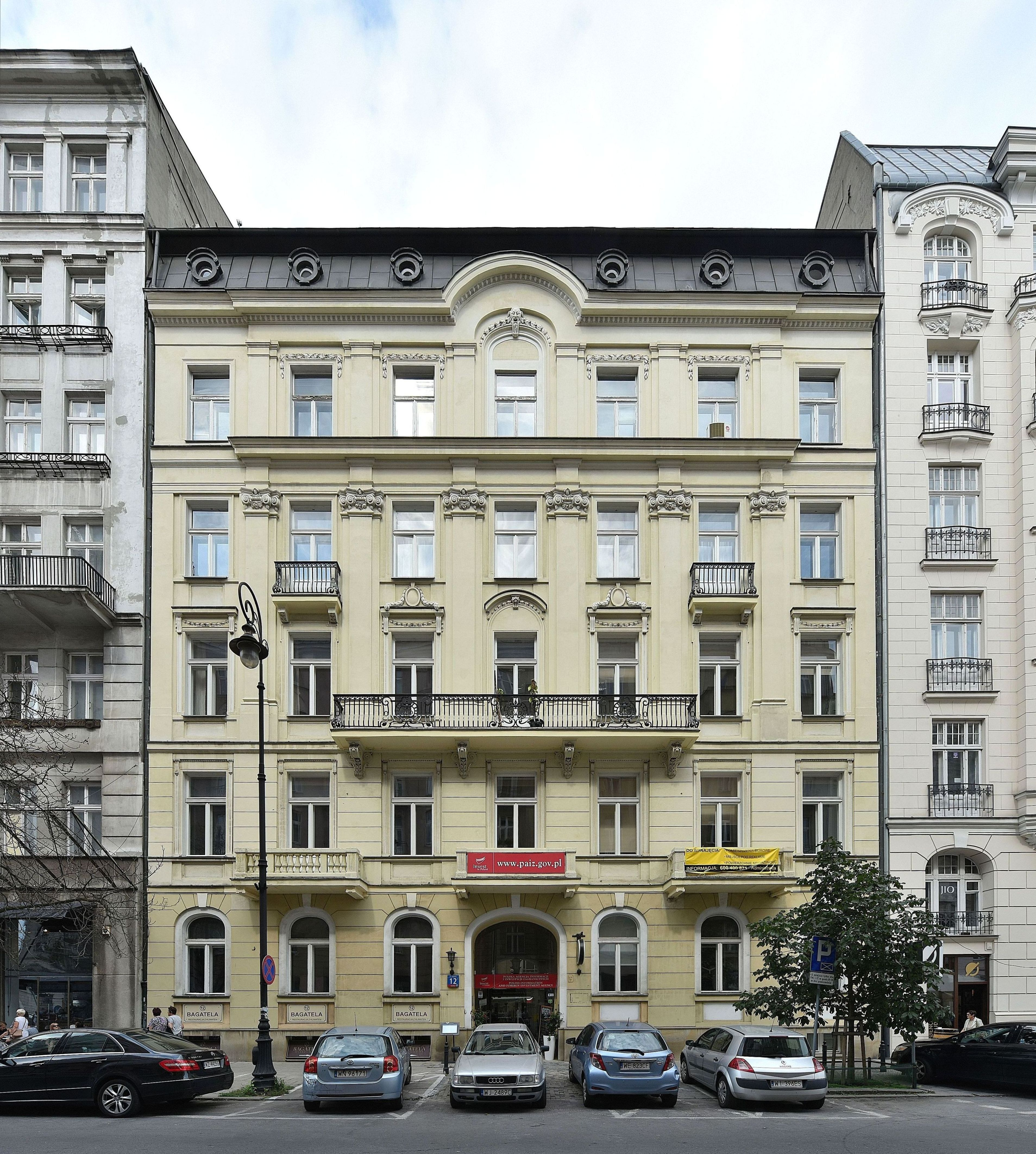 Kamienica przy ul. Bagatela 12, siedziba Polskiej Agencji Informacji i Inwestycji Zagranicznych